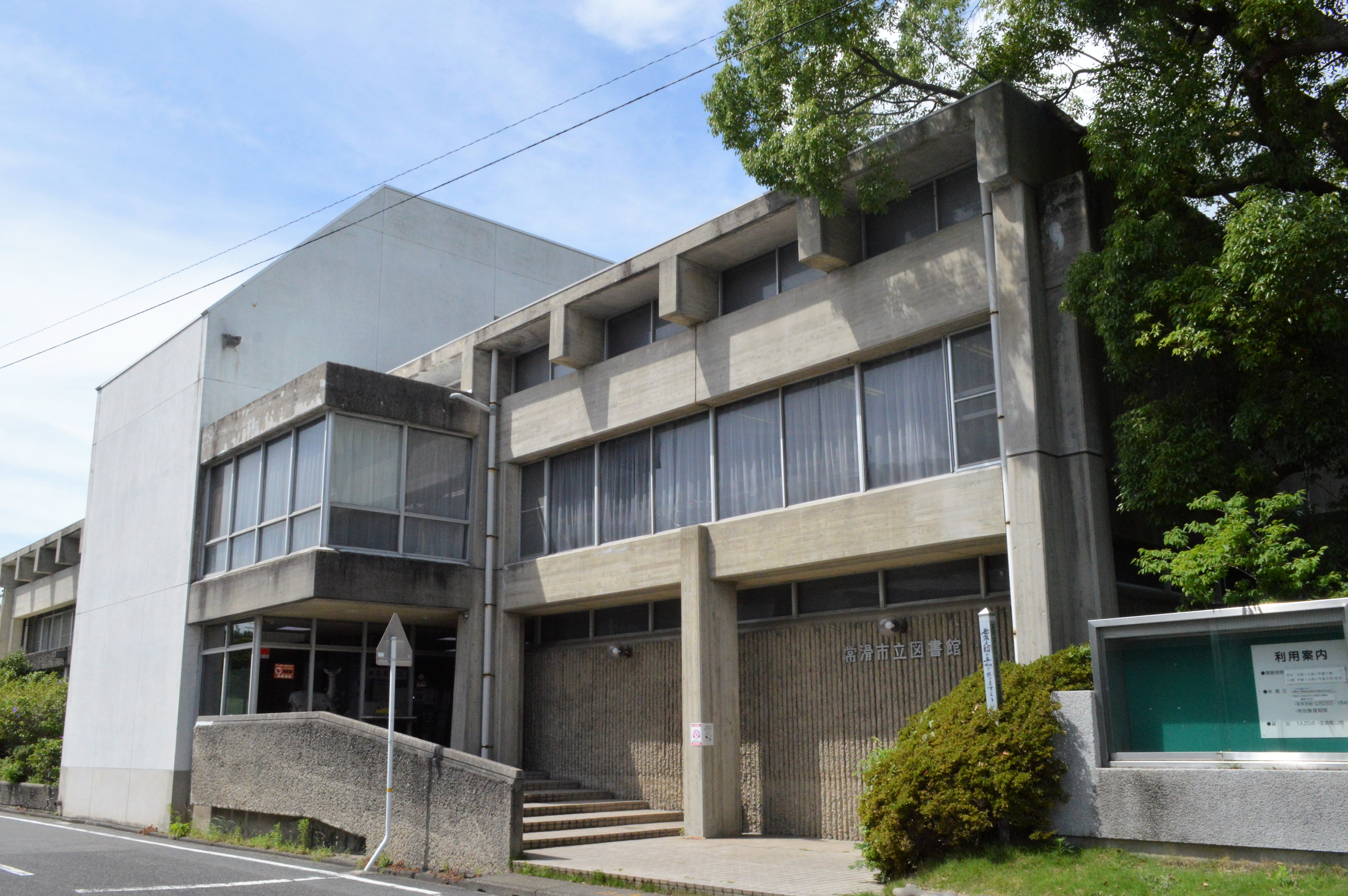 愛知県常滑市の常滑市立図書館。